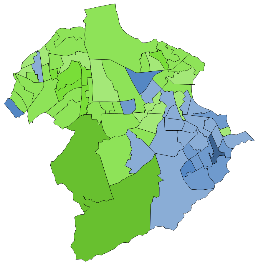 顏色對照表